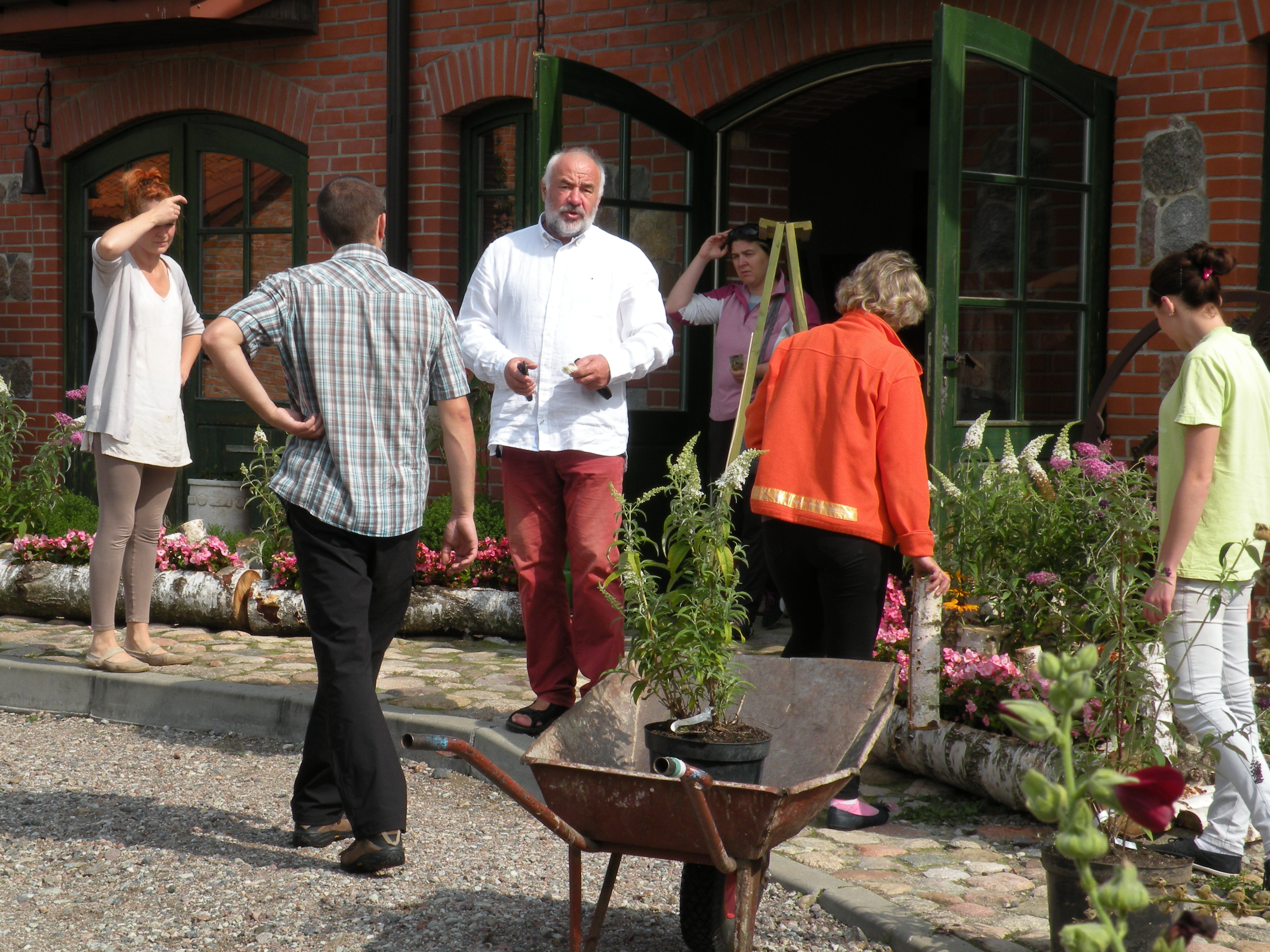 W czasie Dnia Motyla, Garncarska Wioska w Kamionce